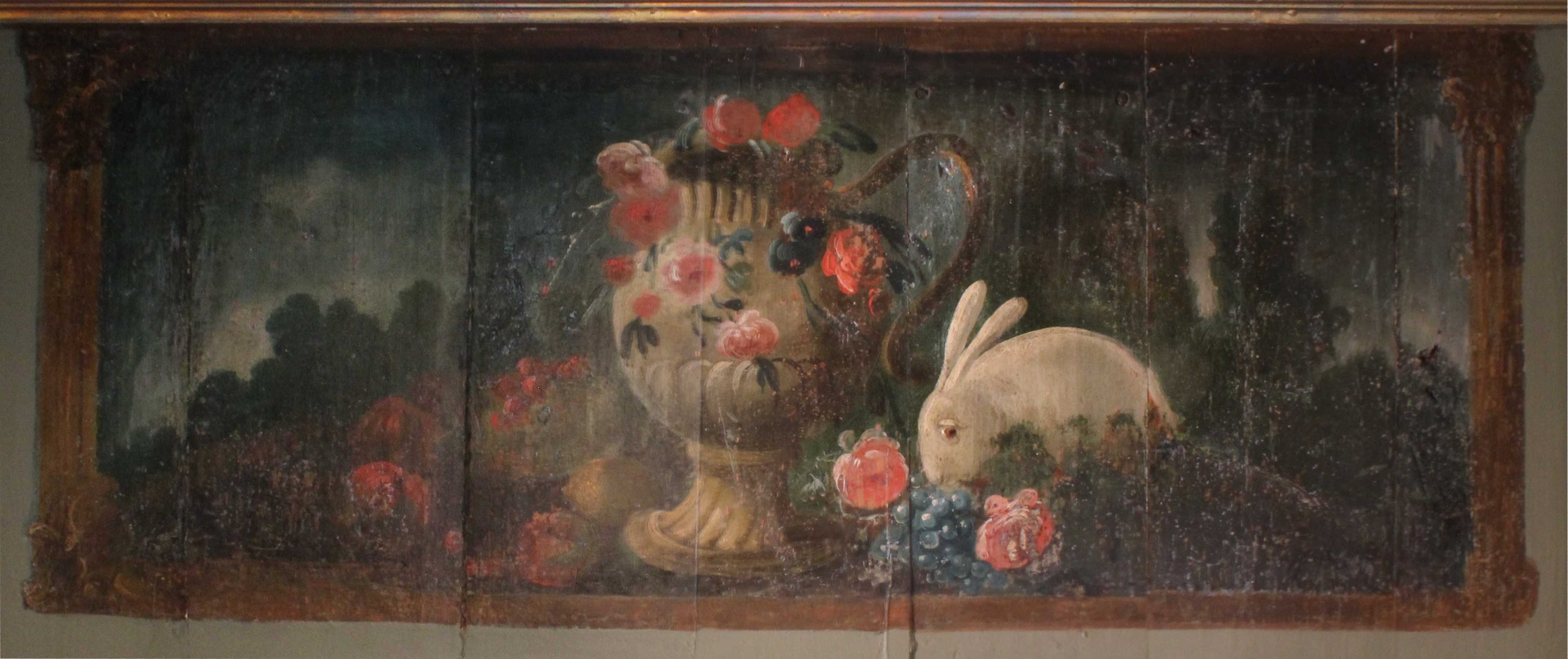 Gjesvål gård, Orkdal. Supraporta fra slutten av 1700-tallet, muligens malt av Johan Carl Cristian Micaelsen.